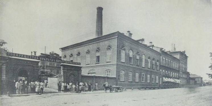 Главный корпус Казанского стеаринового завода Фабрично-торгового товарищества братьев Крестовниковых. Современный адрес: ул. Габдуллы Тукая, 113.